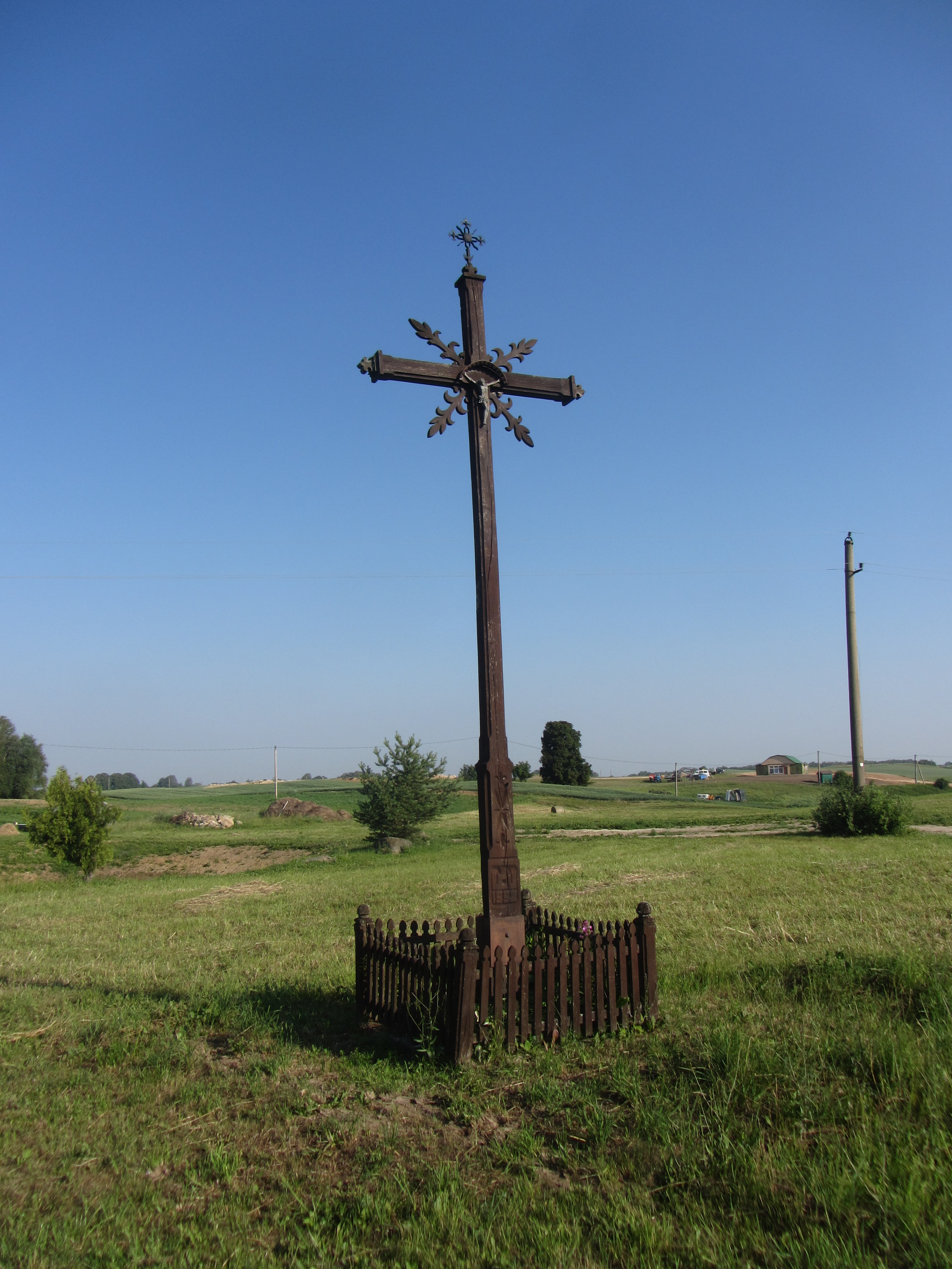 Miroslavo sen., Lithuania